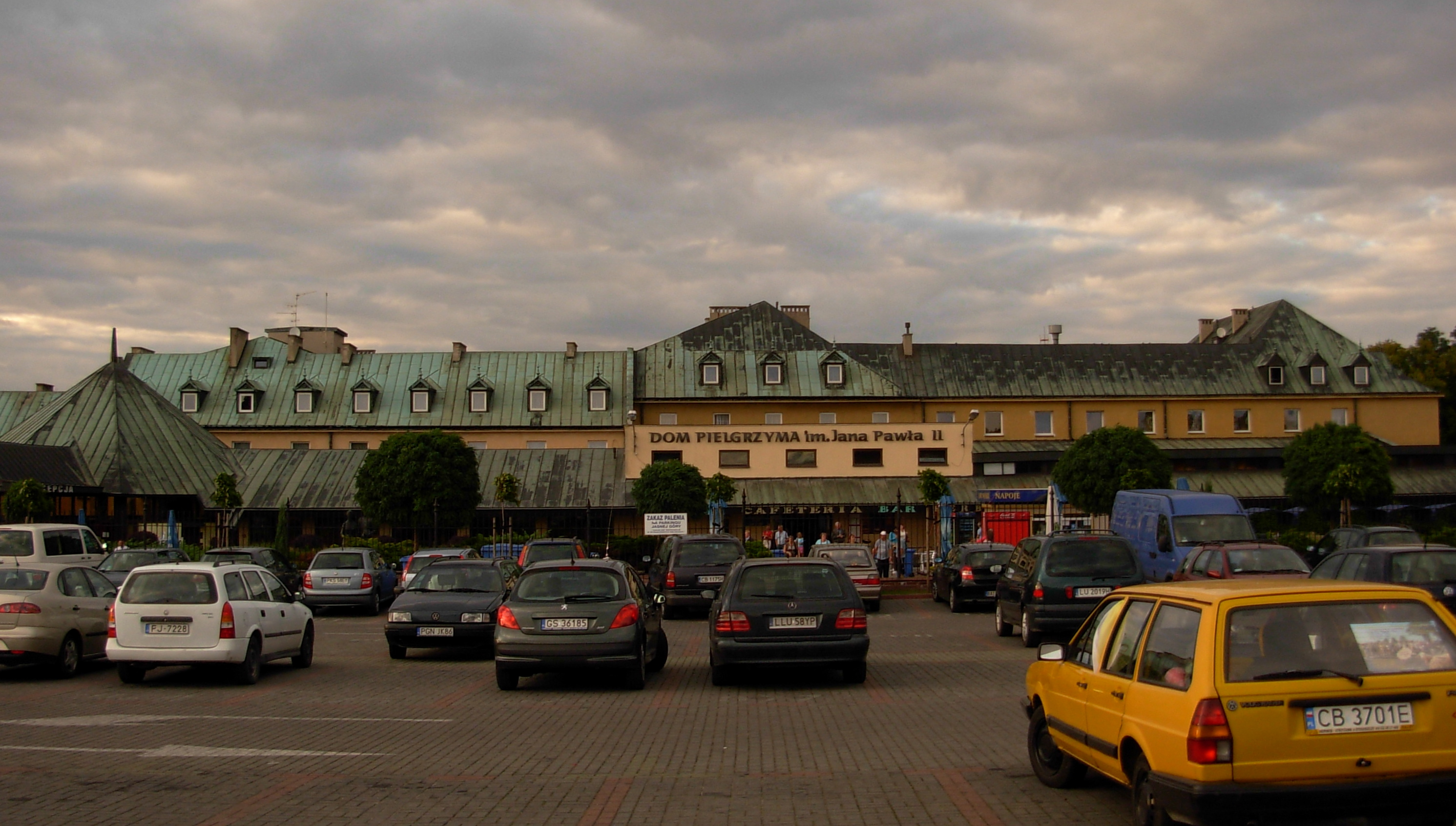 Piligrimų namai Čenstakavoje